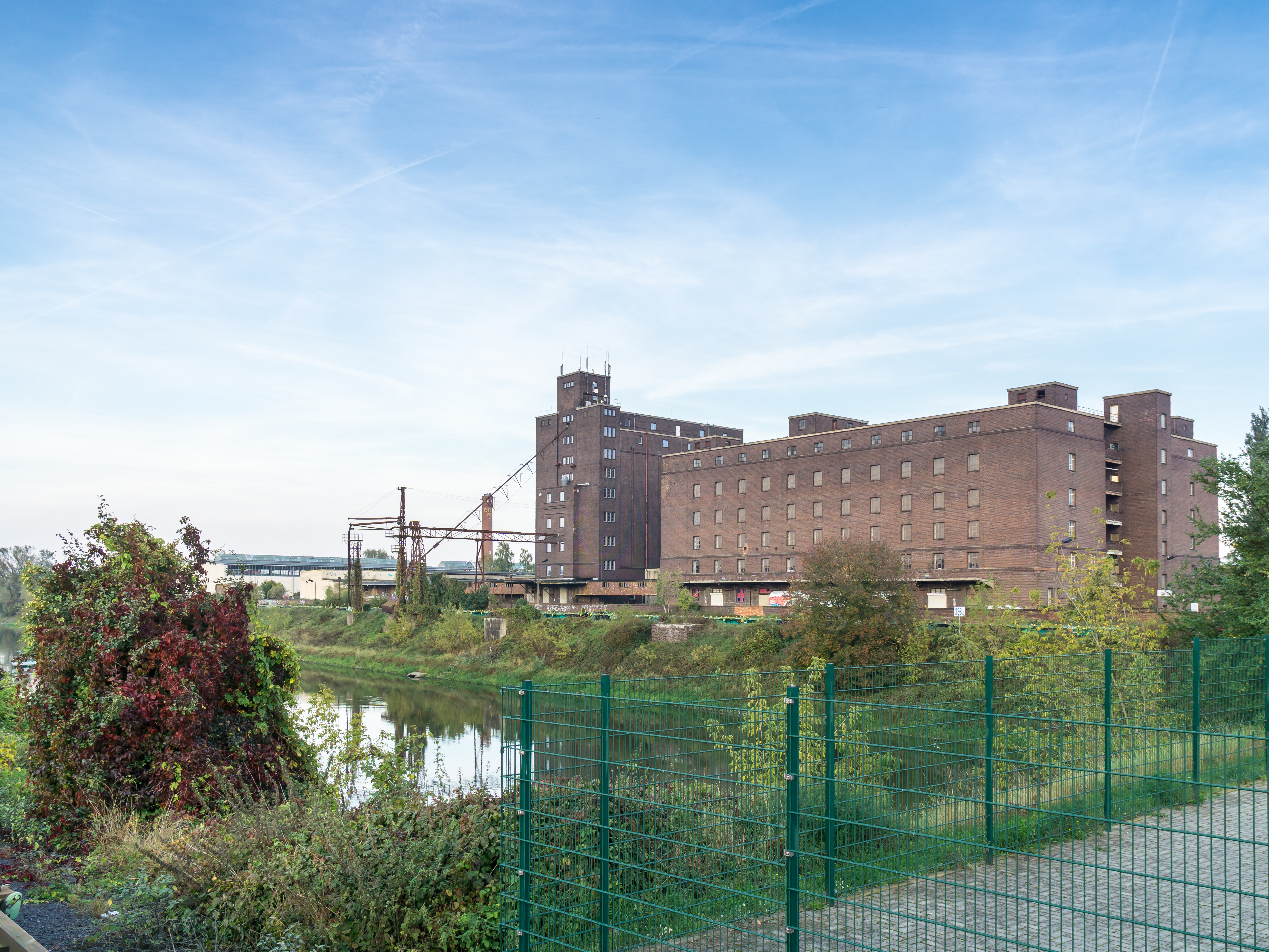 Konsummühle Klosterkamp Klosterkamp 4 in Magdeburg Stt Industriehafen